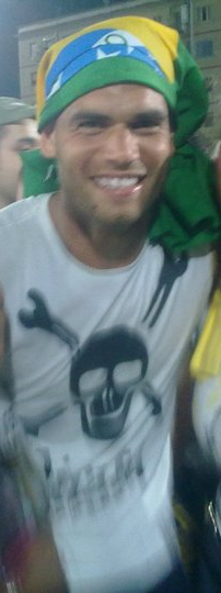 Adriano Sartorio Mezavilla durante i festeggiamenti della Juve Stabia per la promozione in Serie B a Castellammare di Stabia